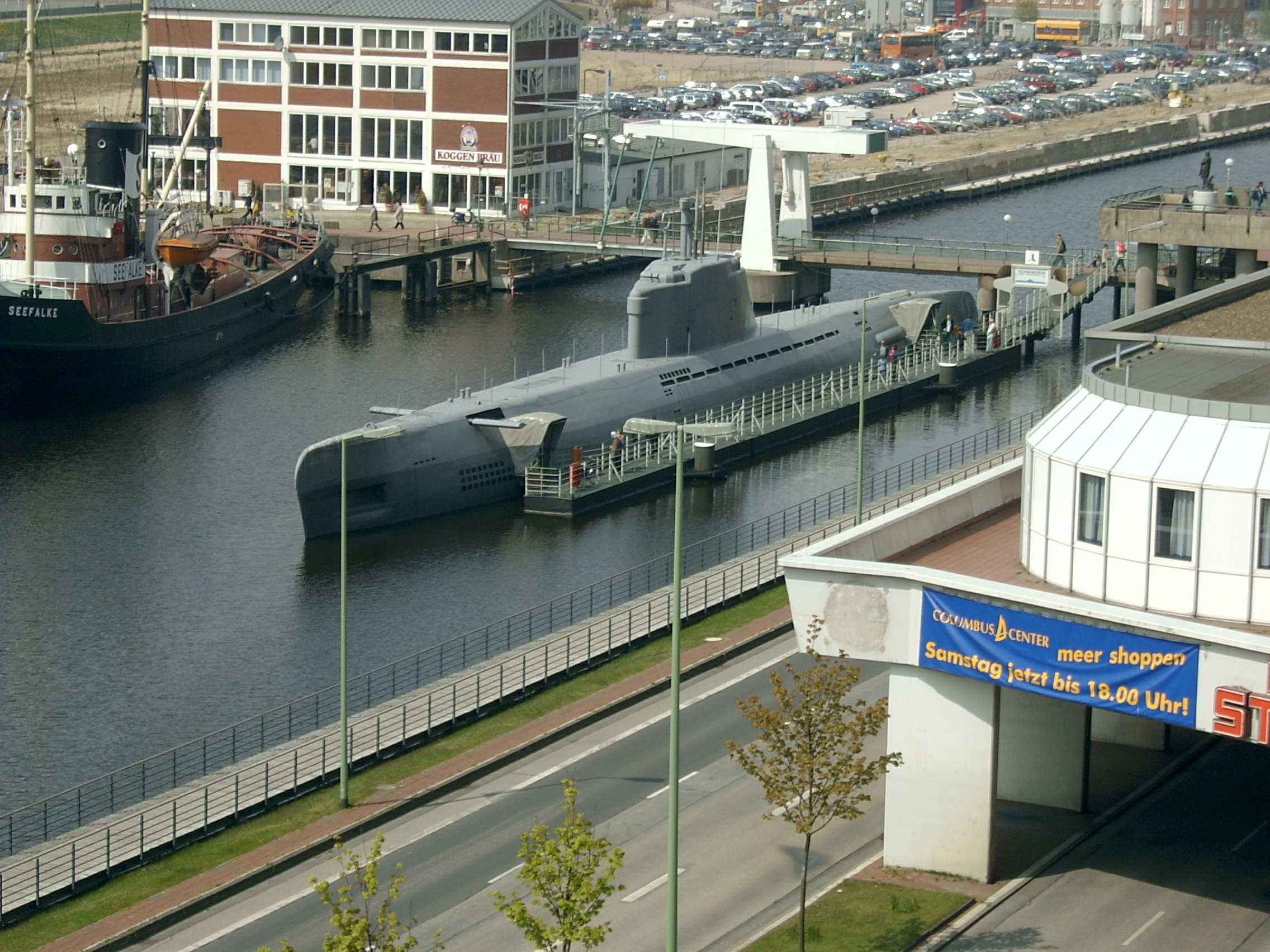 Museums-U-Boot WILHELM BAUER in Bremerhaven